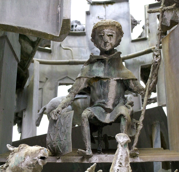 Mönch mit einem Kreuz in der linken Hand in der rechten eine Tafel mit drei W Synonym für Weck, Worscht un Woi auf dem Fastnachtsbrunnen (Mainz) in Mainz